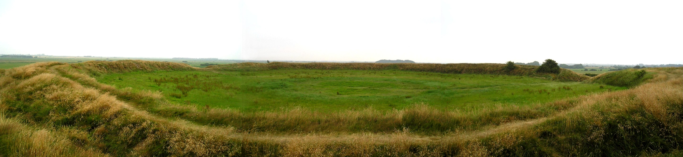 Lembecksburg auf Föhr - vom westlichen Ringwall aus, Juli 2006 Eigenes Werk own work